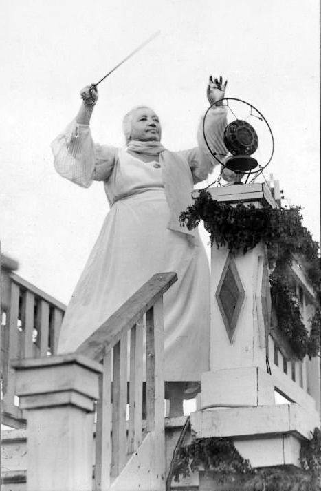 Laulupidu, dirigendipuldis Miina Härma